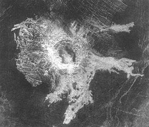 de Lalande crater on Venus